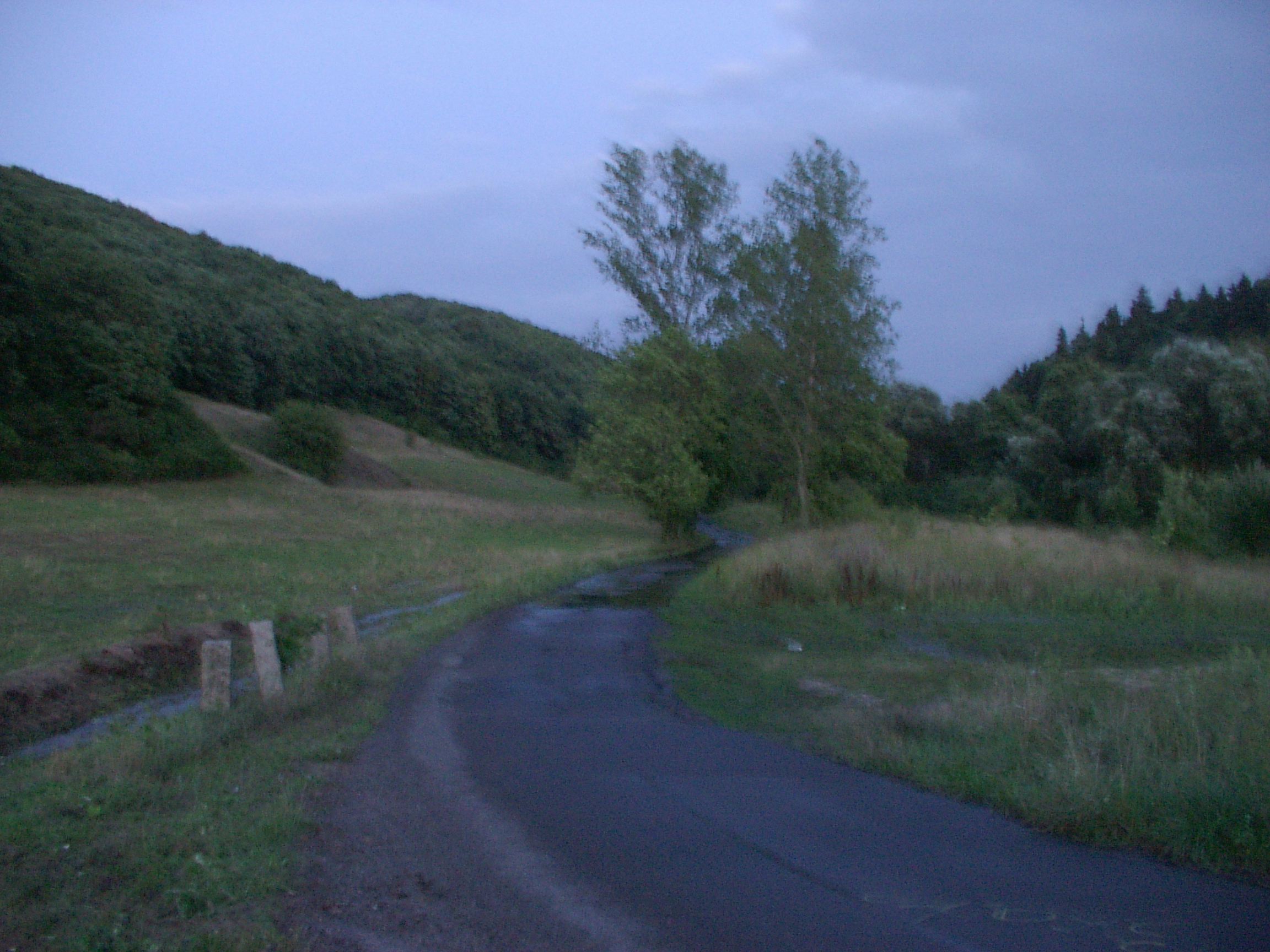 Książański Park Krajobrazowy we wsi Chwaliszów, pow. wałbrzyski, województwo dolnośląskie